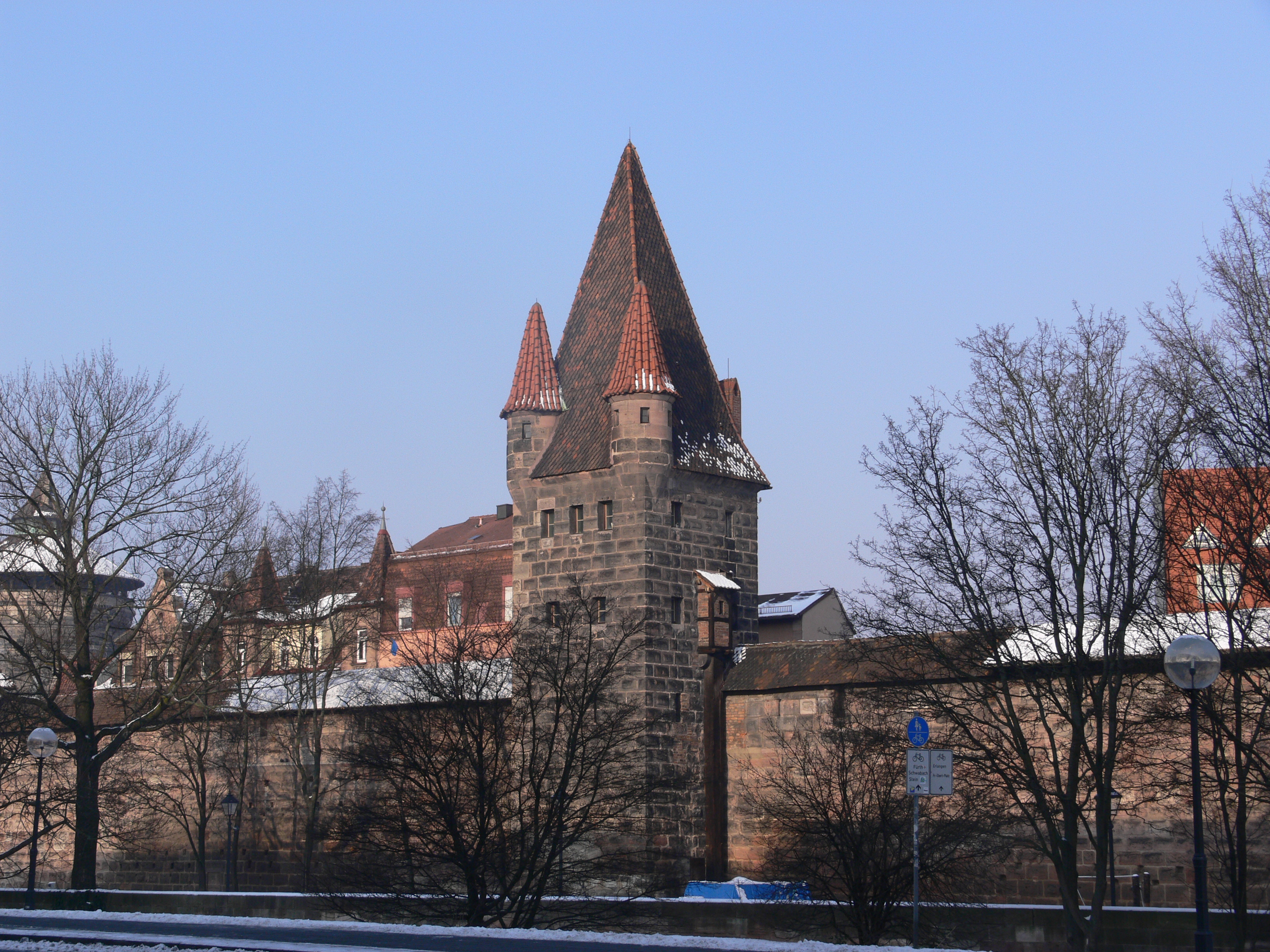 Nürnberg, Stadtbefestigung, Abschnitt "Frauentormauer" Turm "rotes M", Feldseite